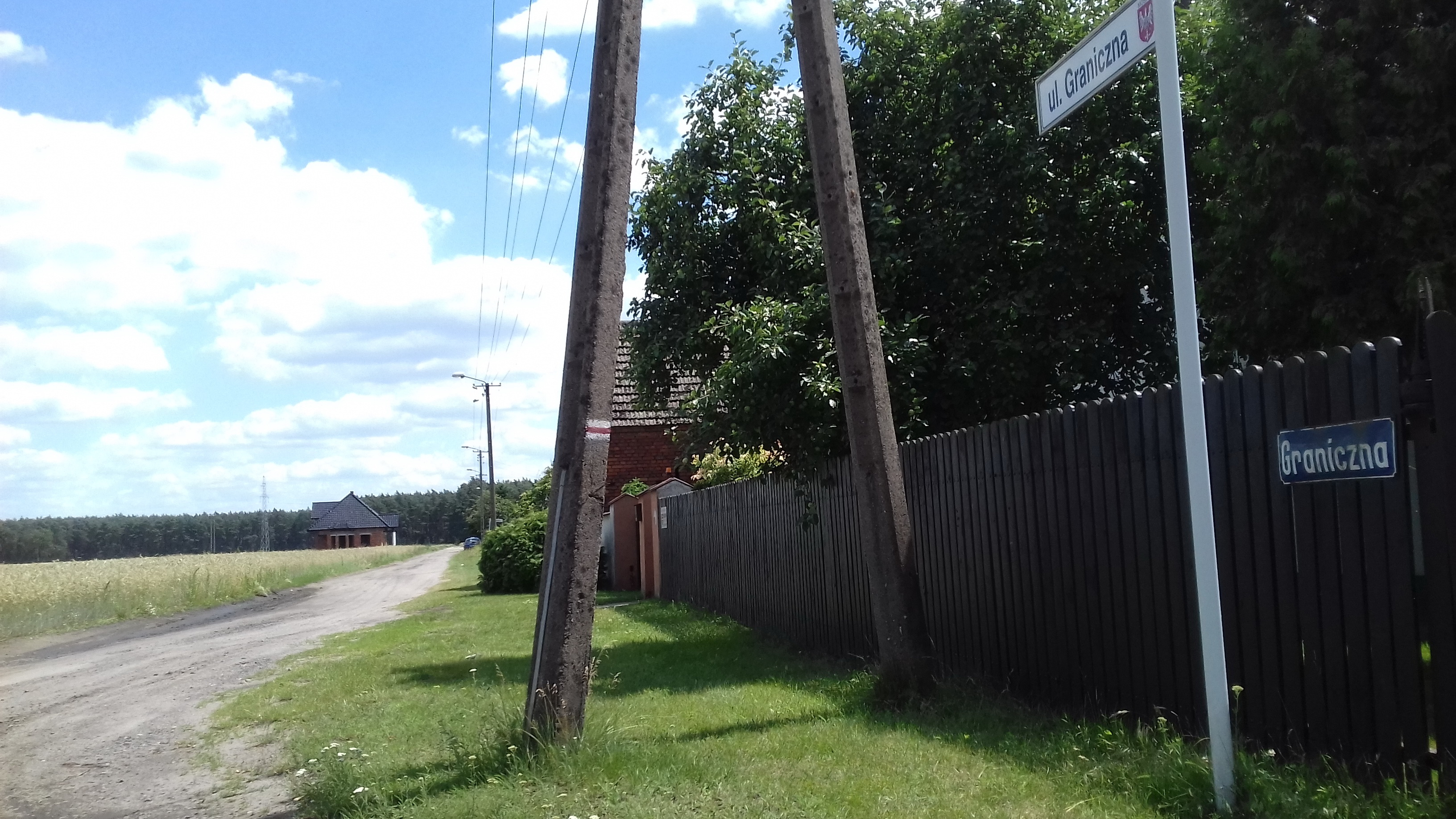 Oznaczenie szlaku pieszego nr 3578 w Drużynie (ulica Graniczna)